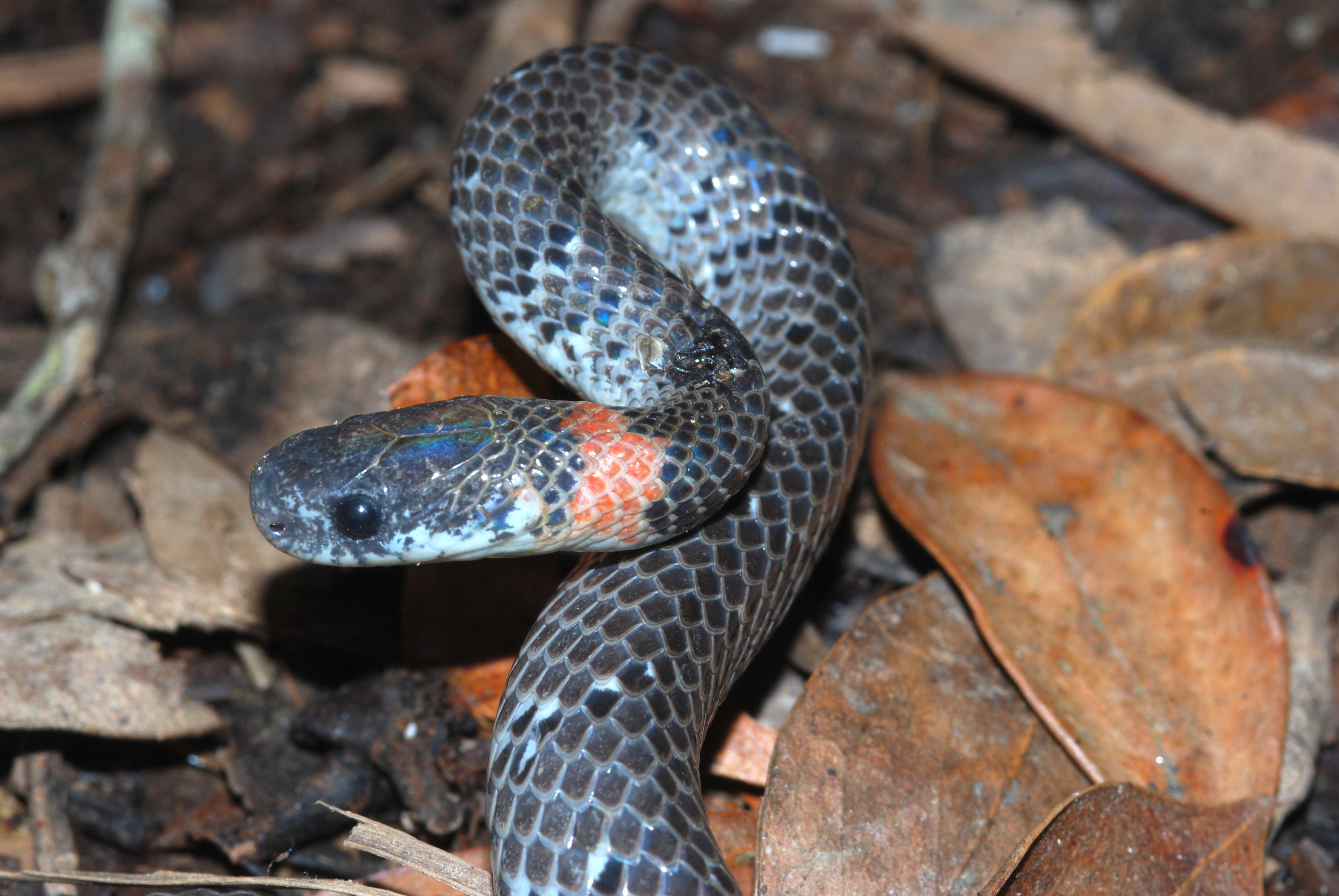 Tapah Hills, Perak, MALAYSIA